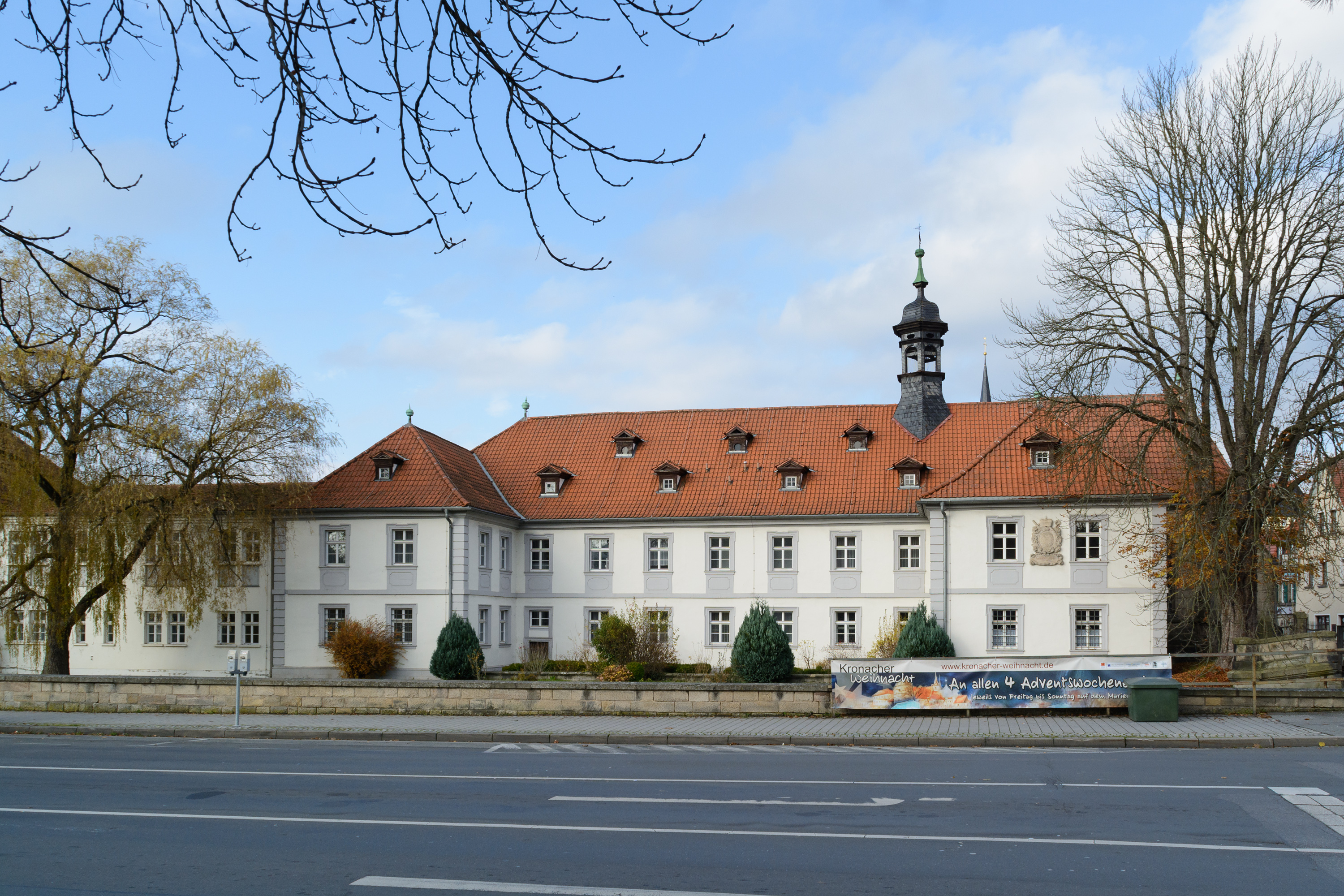 Gebäude Spitalstraße 9 in Kronach, Bürgerspital.